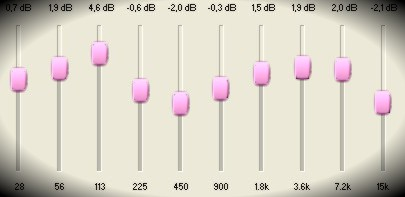 Digitális EQ-modellezés